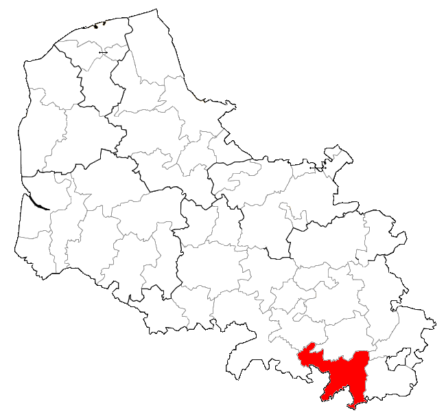 Localisation de la CCRB dans le Pas-de-Calais.